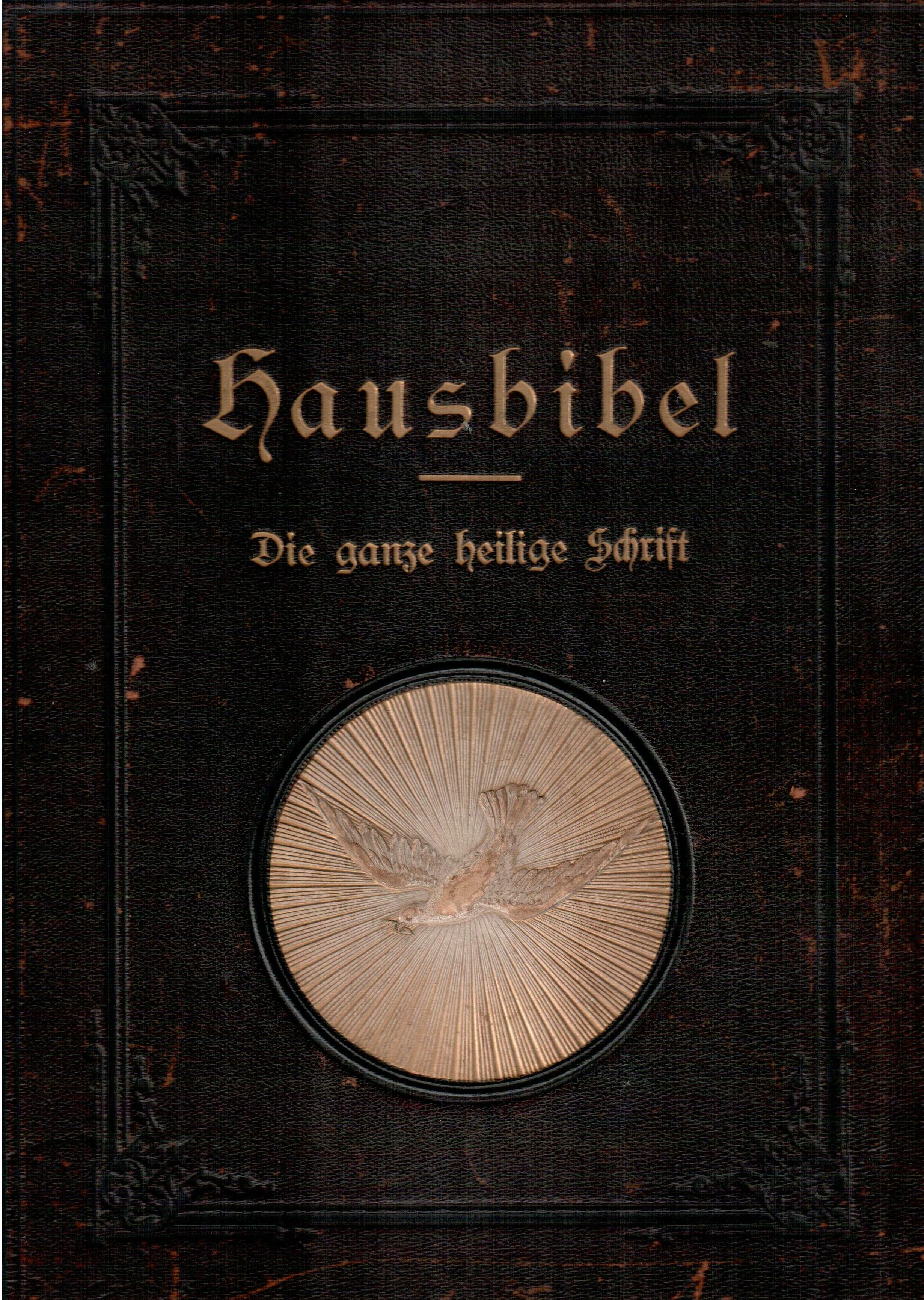 Cover der Schlachter Hausbibel von 1907